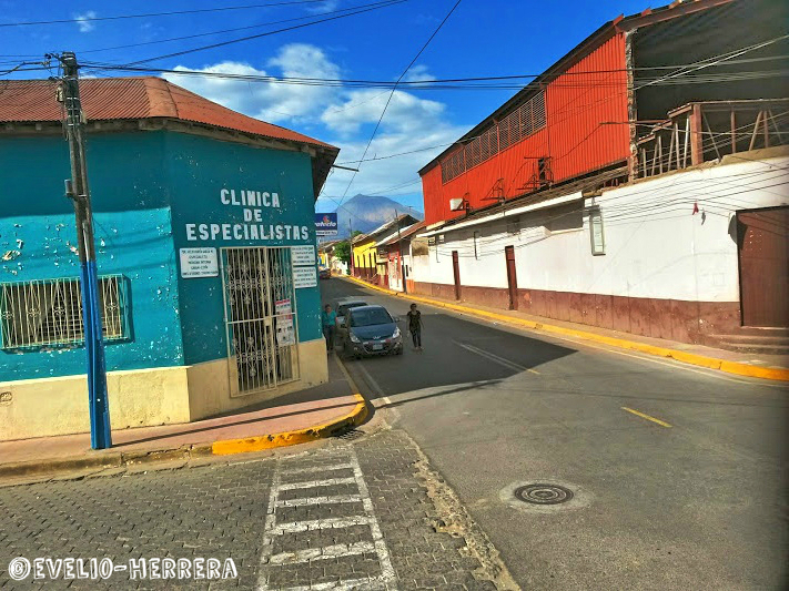 Avenida Central Donde se observa el edifico rojo en proceso de demolicion para otro mas moderno y nuevo de una empresa de seguros